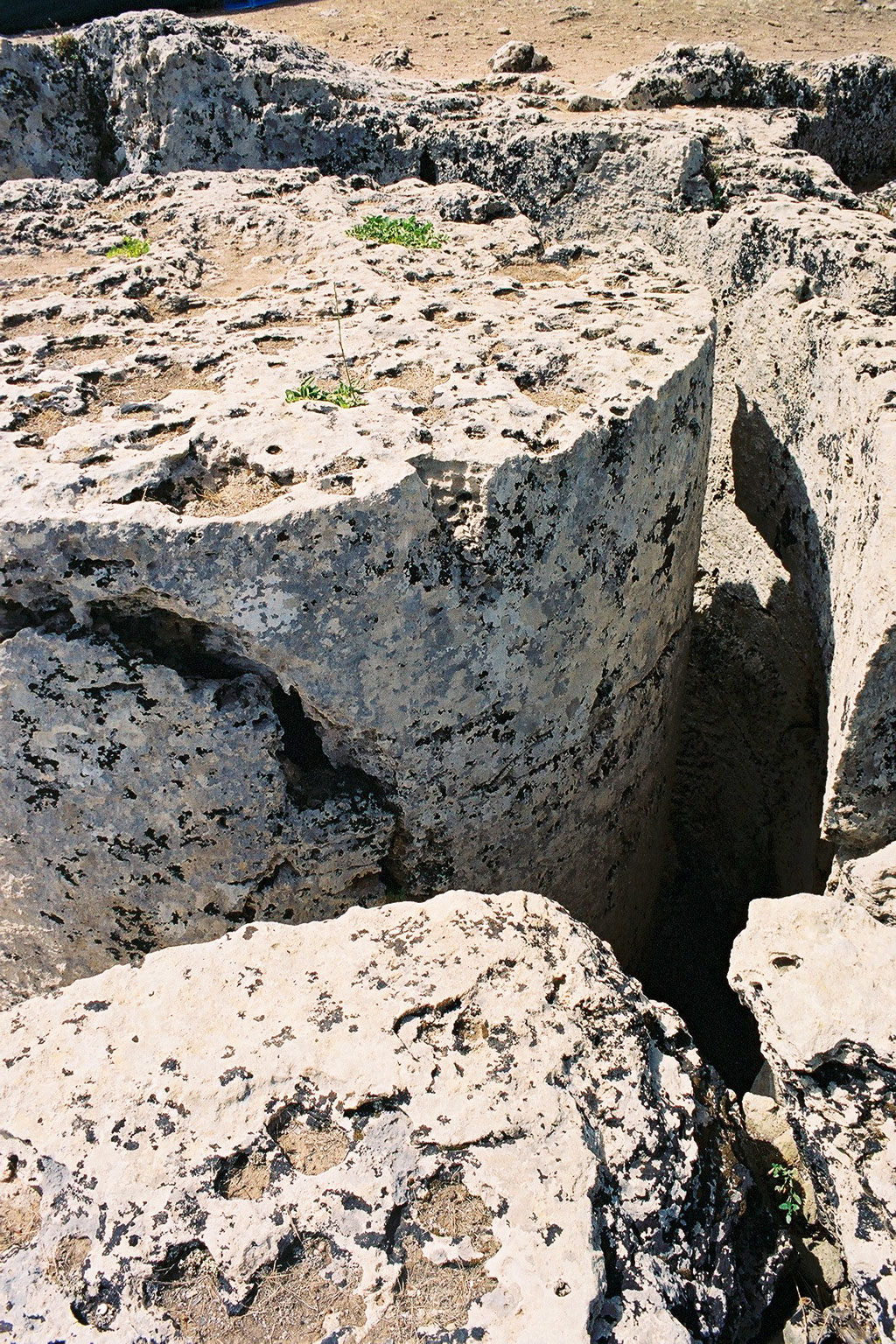 Rocche di Cusa, Campobello di Mazara Quarry for Selinunte, raw columns for unfinished temple G